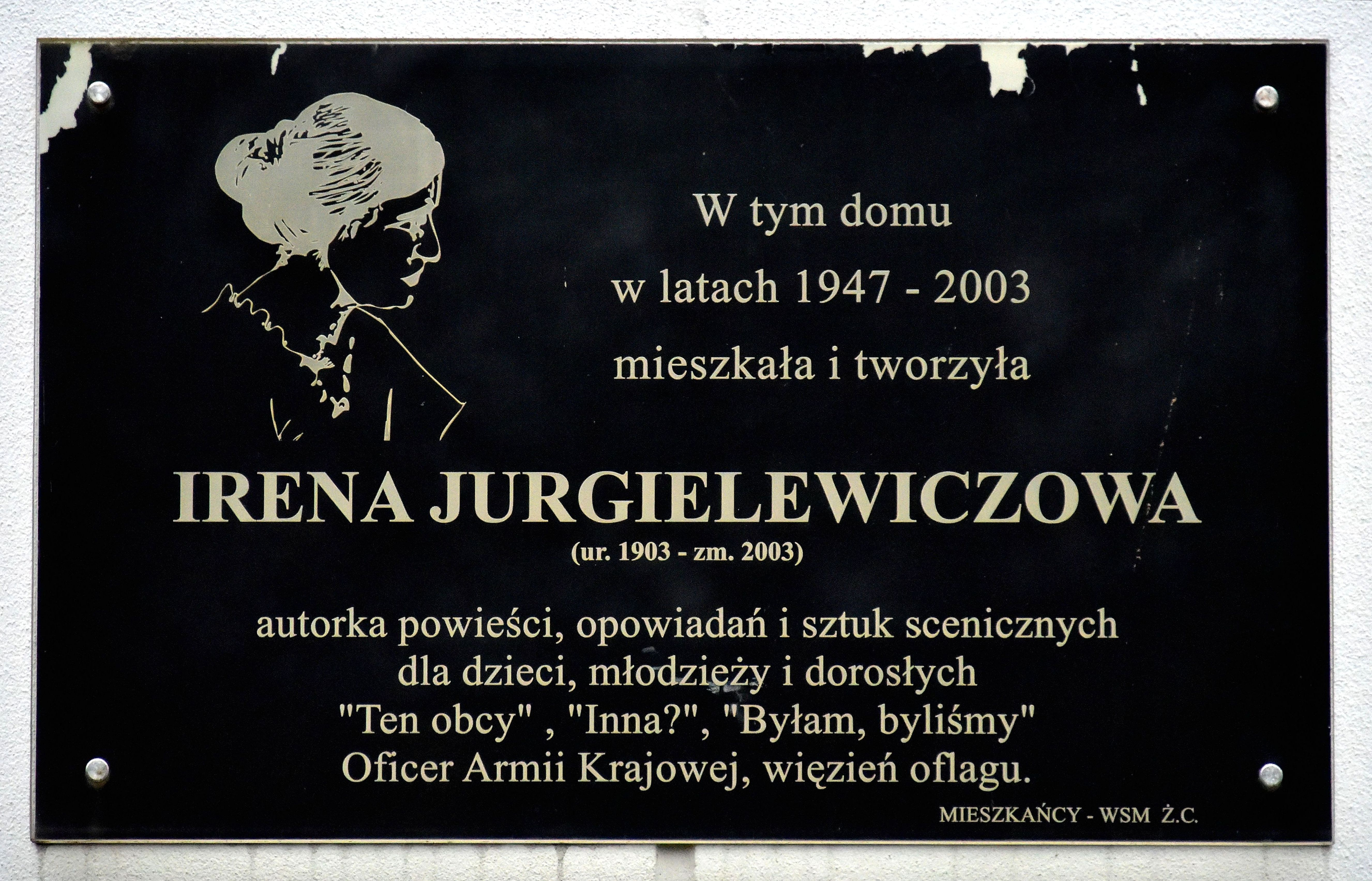 Tablica upamiętniająca Irenę Jurgielewiczową przy ul. Sarbiewskiego 2 w Warszawie